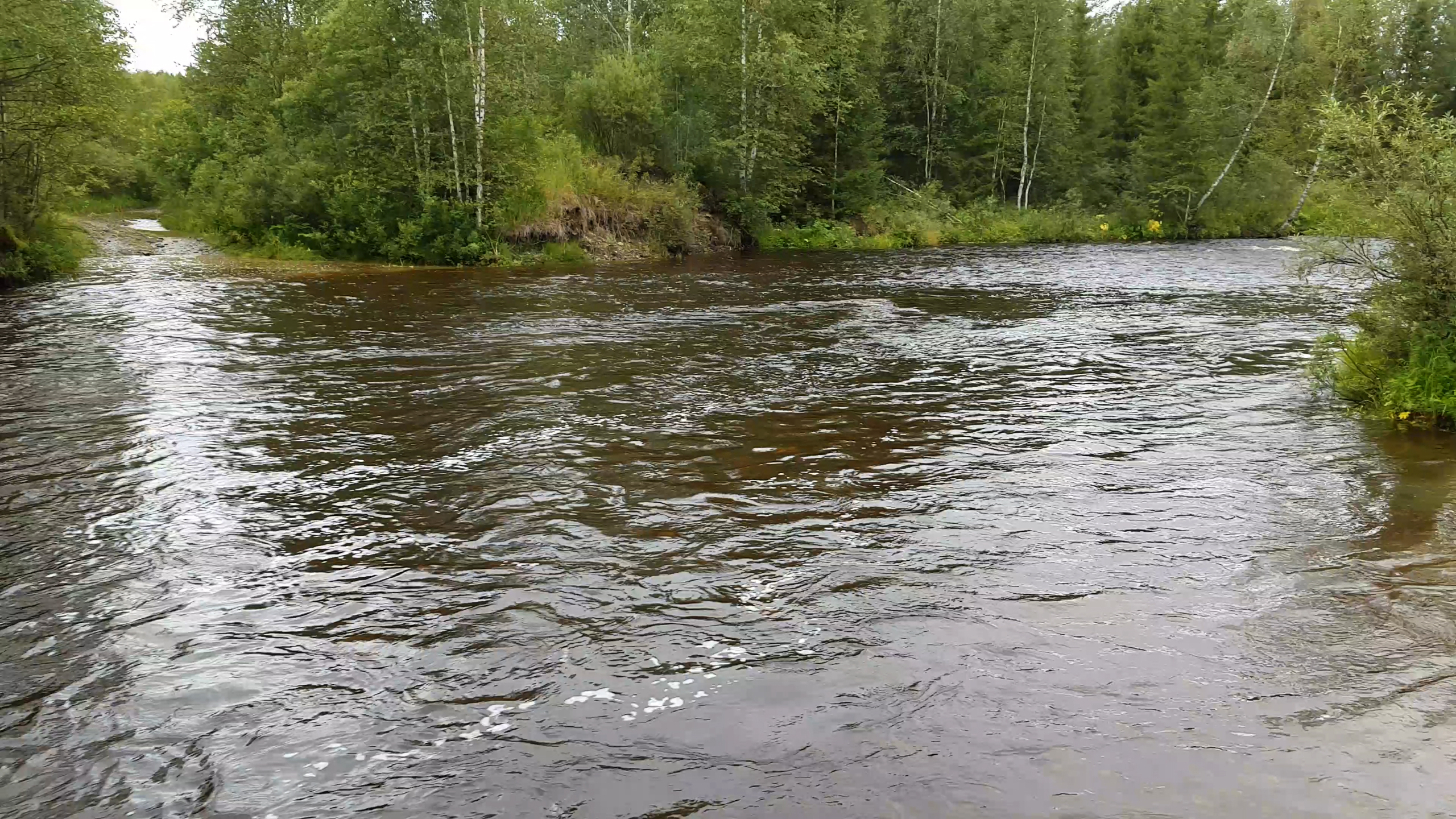 Река Тохта